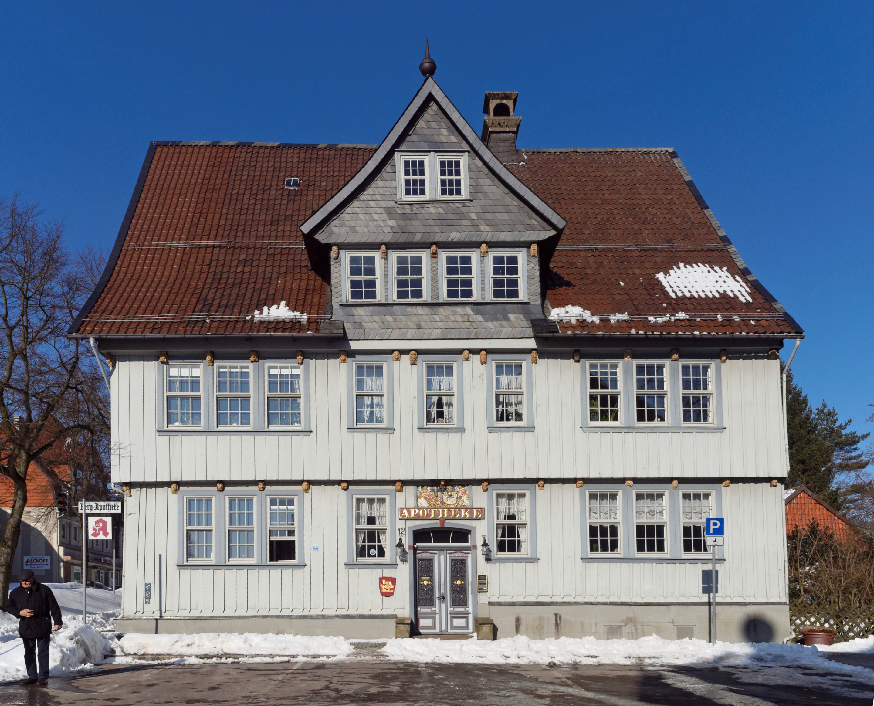 Historische Bergapotheke in Zellerfeld. Die Apotheke wurde im Jahre 1576 von Herzog Julius zu Braunschweig-Wolfenbüttel begründet. Nachdem sie im großen Stadtbrand von Zellerfeld am 18. Oktober 1672 niederbrandte, wurde sie schließlich 1674 von Jakob Andreas Herstelle in der heutigen Form wiedererrichtet.